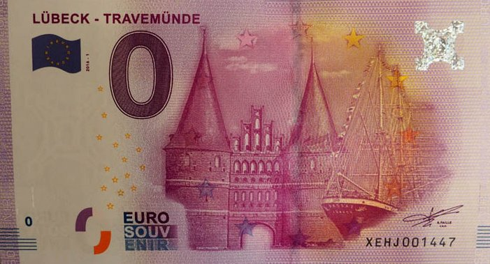 0-Euroschein Lübeck, Holstentor (2016)